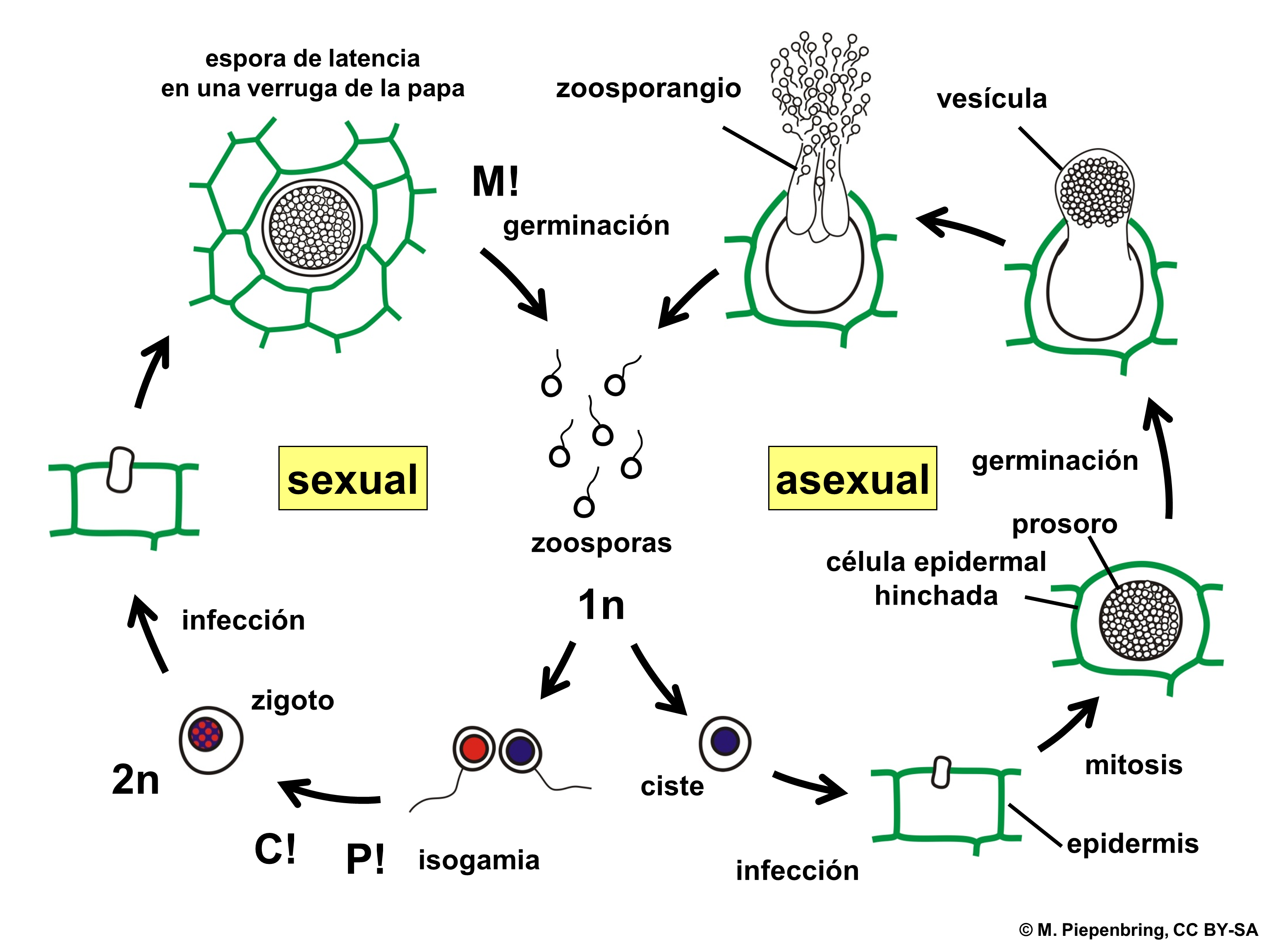 Biologische Schemata, gezeichnet und freigegeben von M. Piepenbring